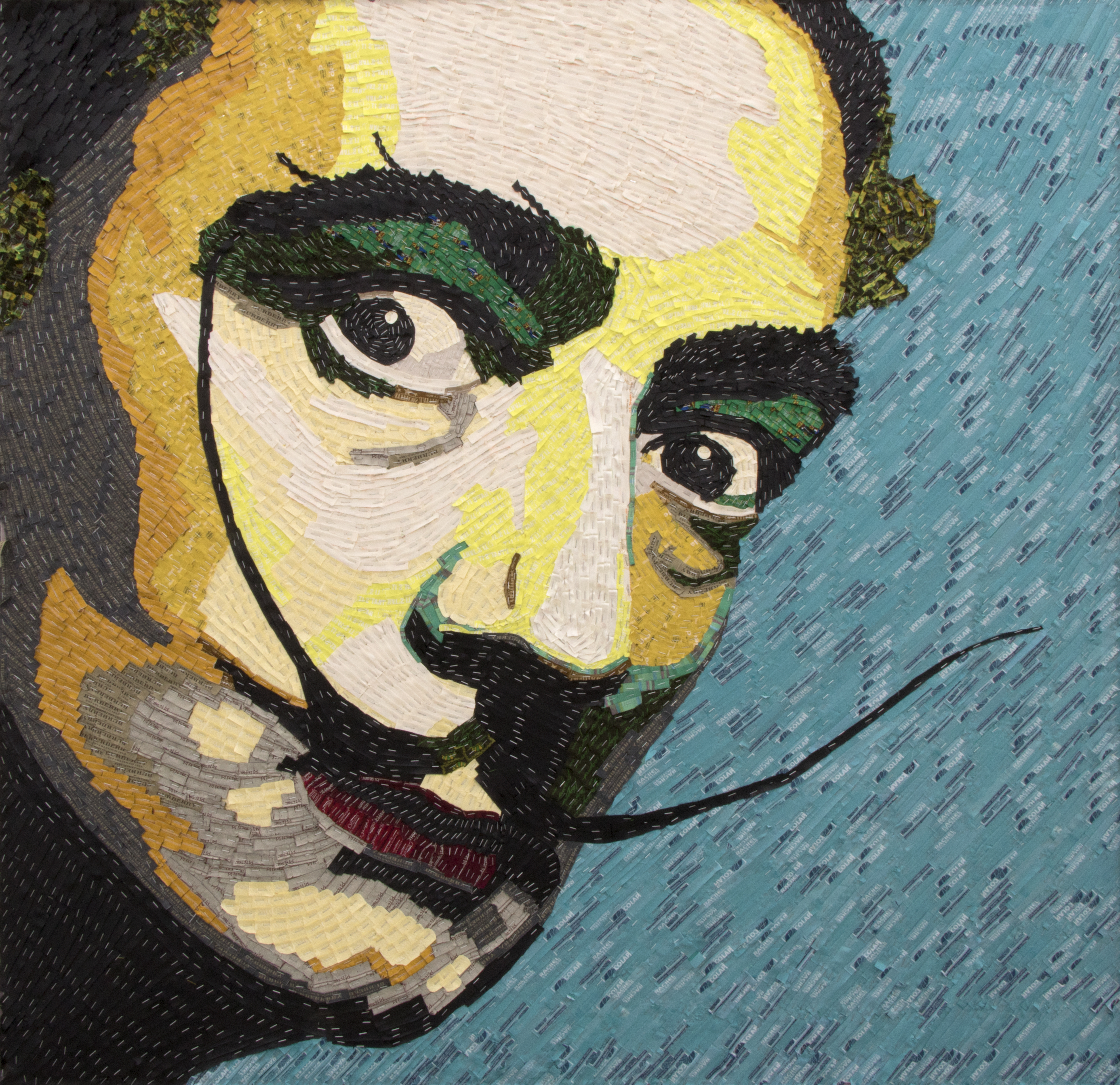 Retrato de salvador dalí hecho con etiquetal textiles